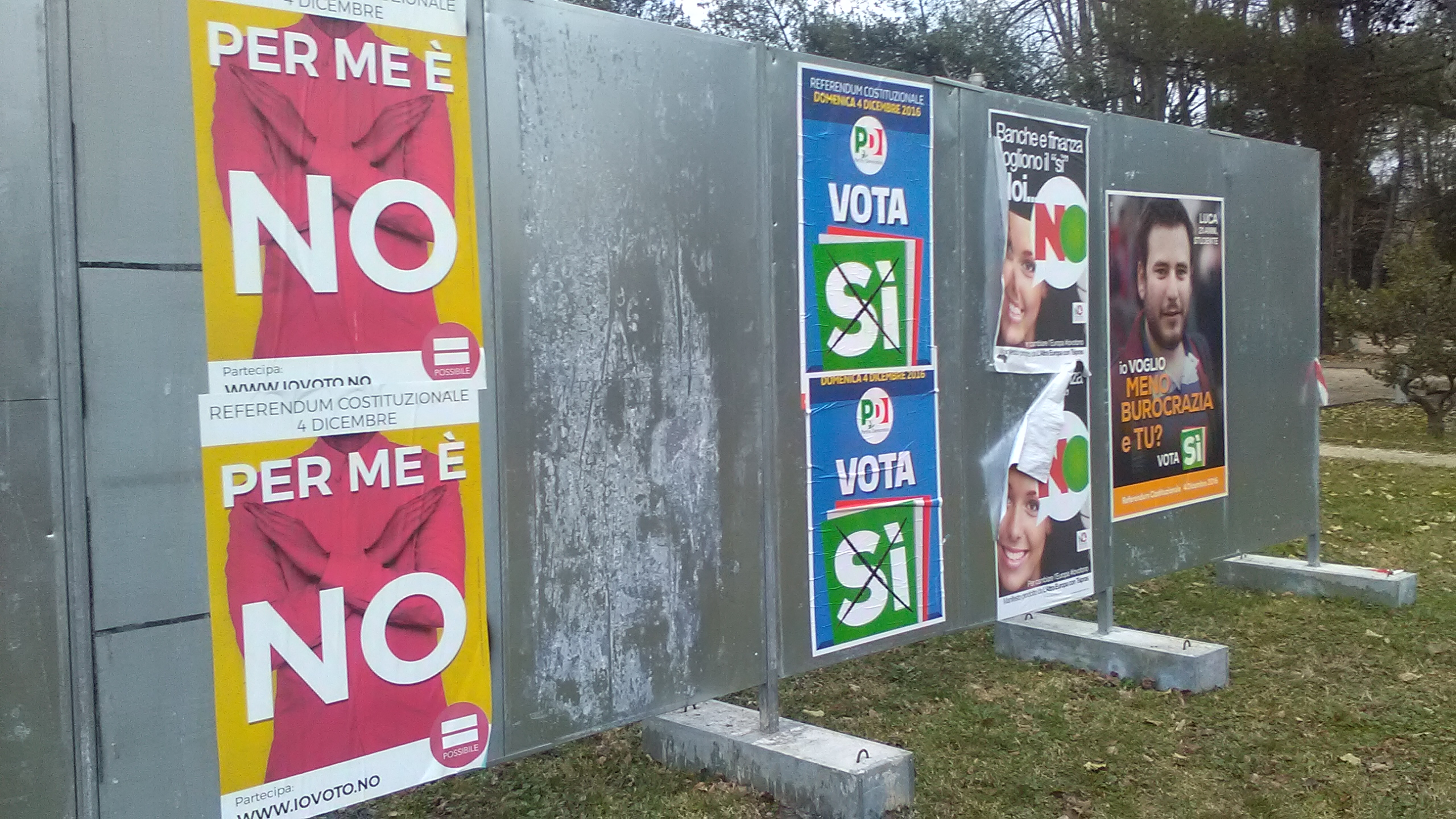 Propaganda in occasione del referendum costituzionale 2016